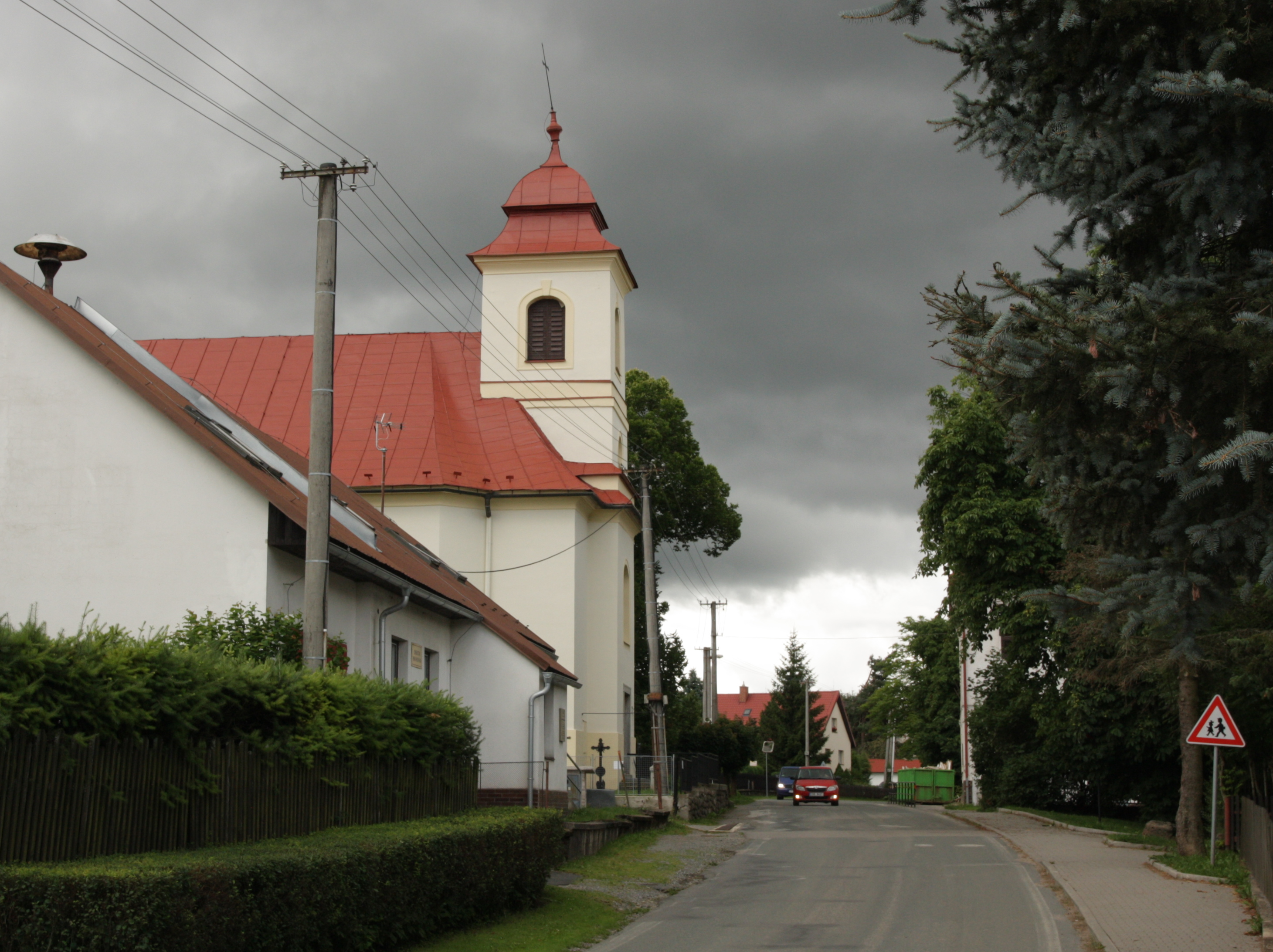 Fryšava pod Žákovou horou - centrum obce s kostelem